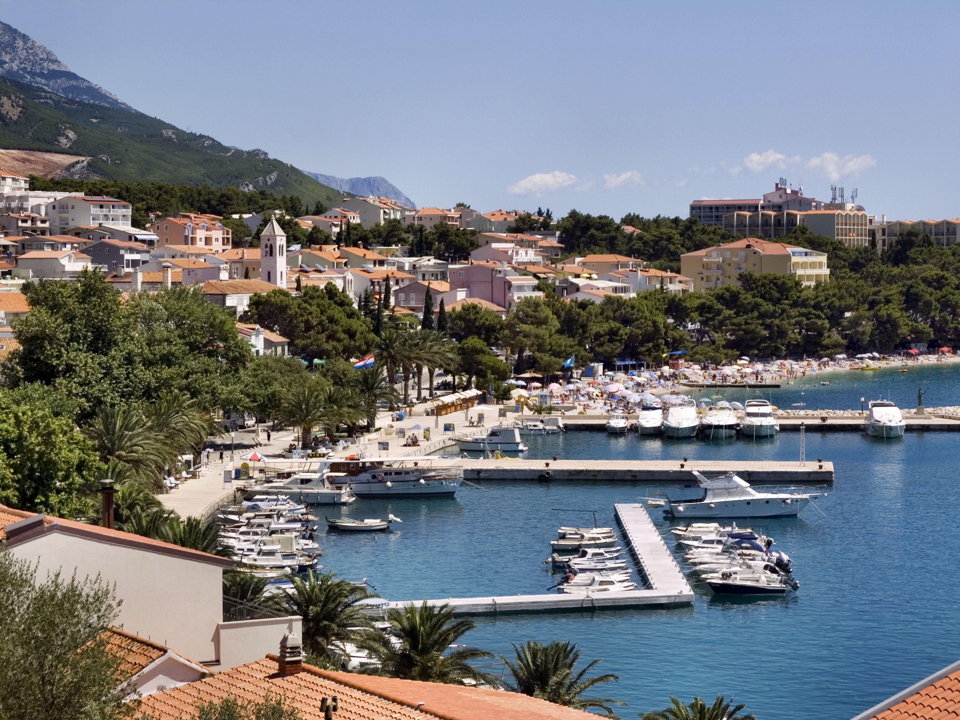 Хорватия, Башка Вода, Вид с Градины на порт